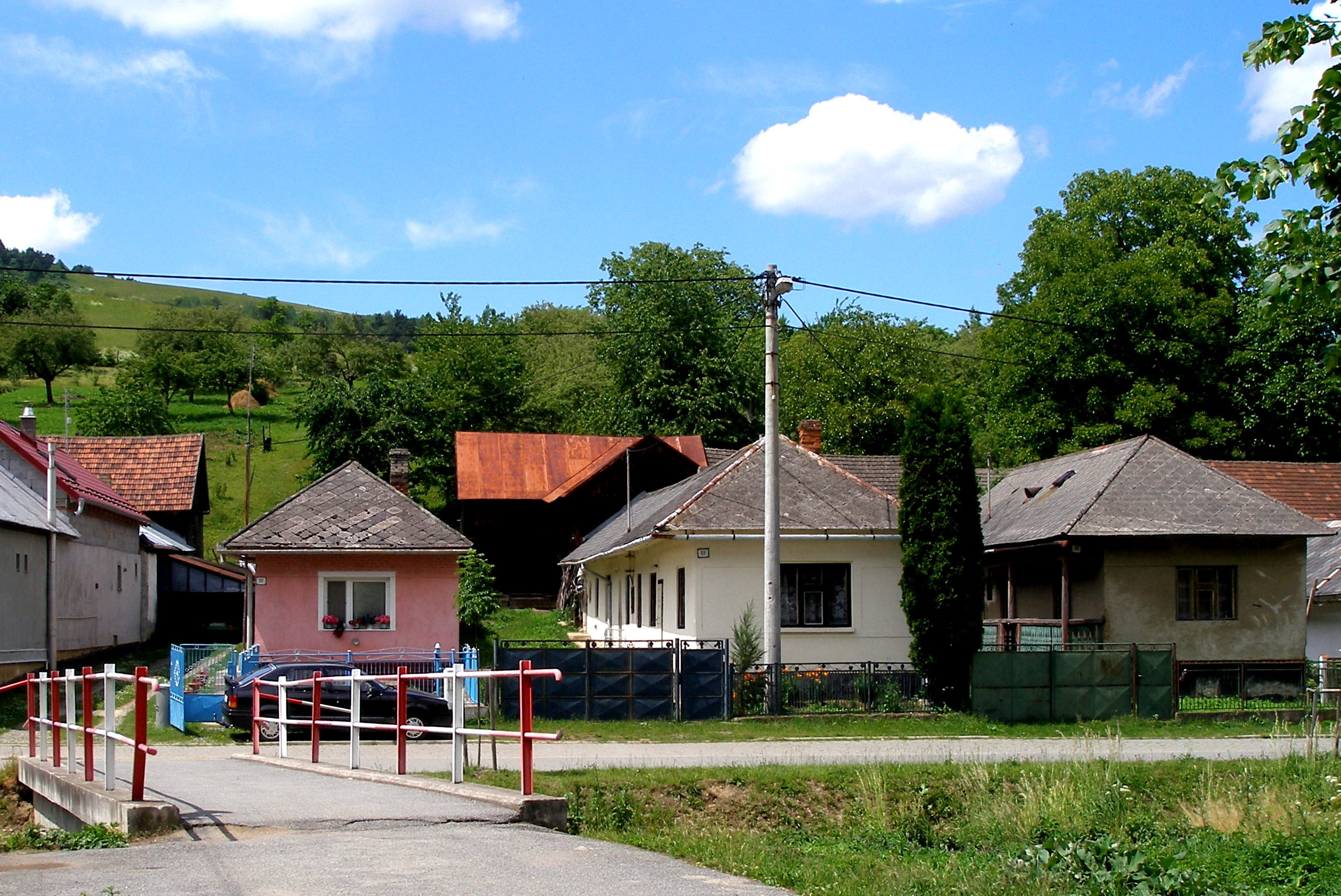 Obec Dubovica okres Sabinov